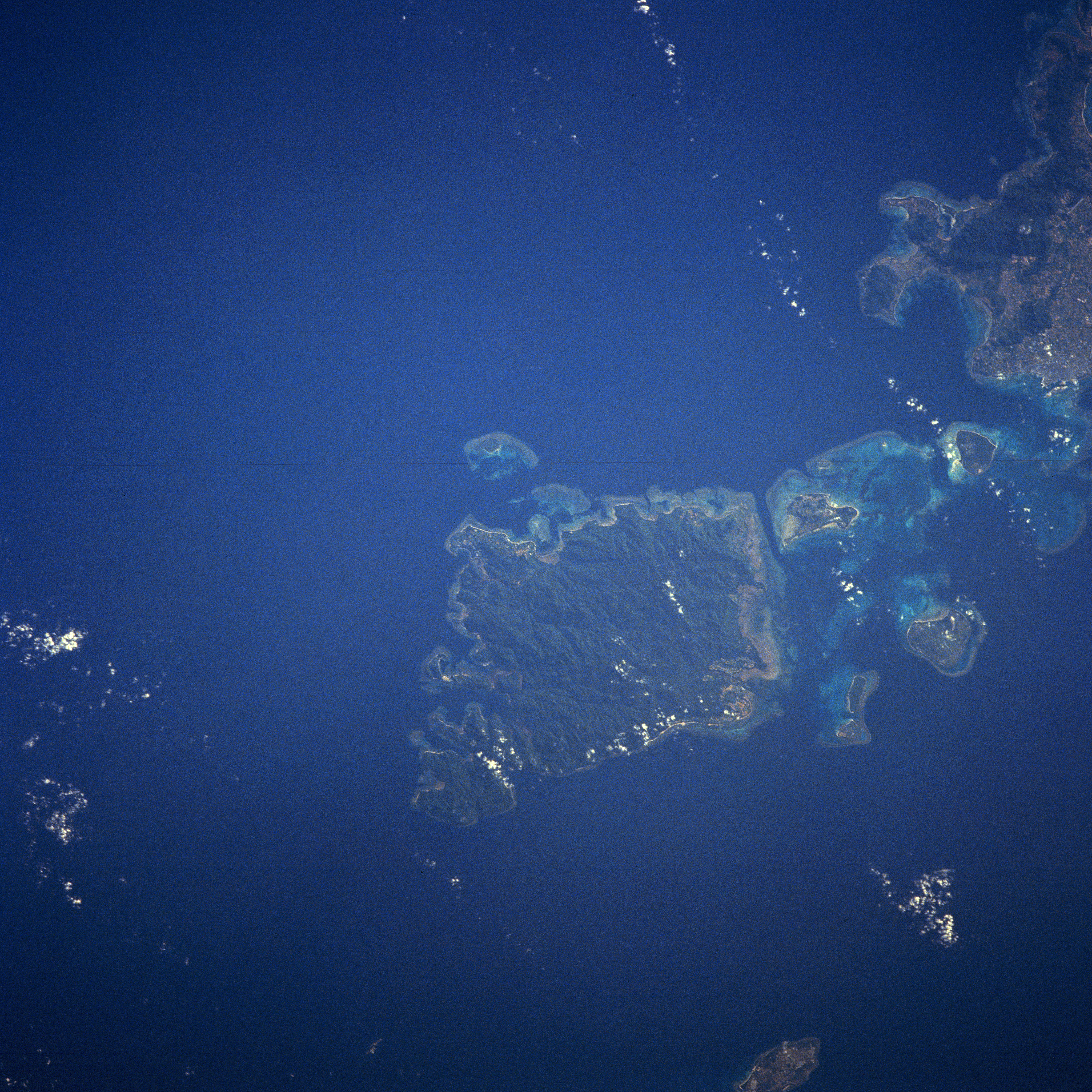 西表島 Iriomote Island, Ryukyu Islands - August 1991 image description here